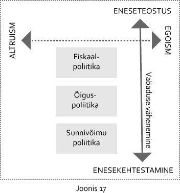 (Mitte)Vabaduse teljele paigutatud poliitikad